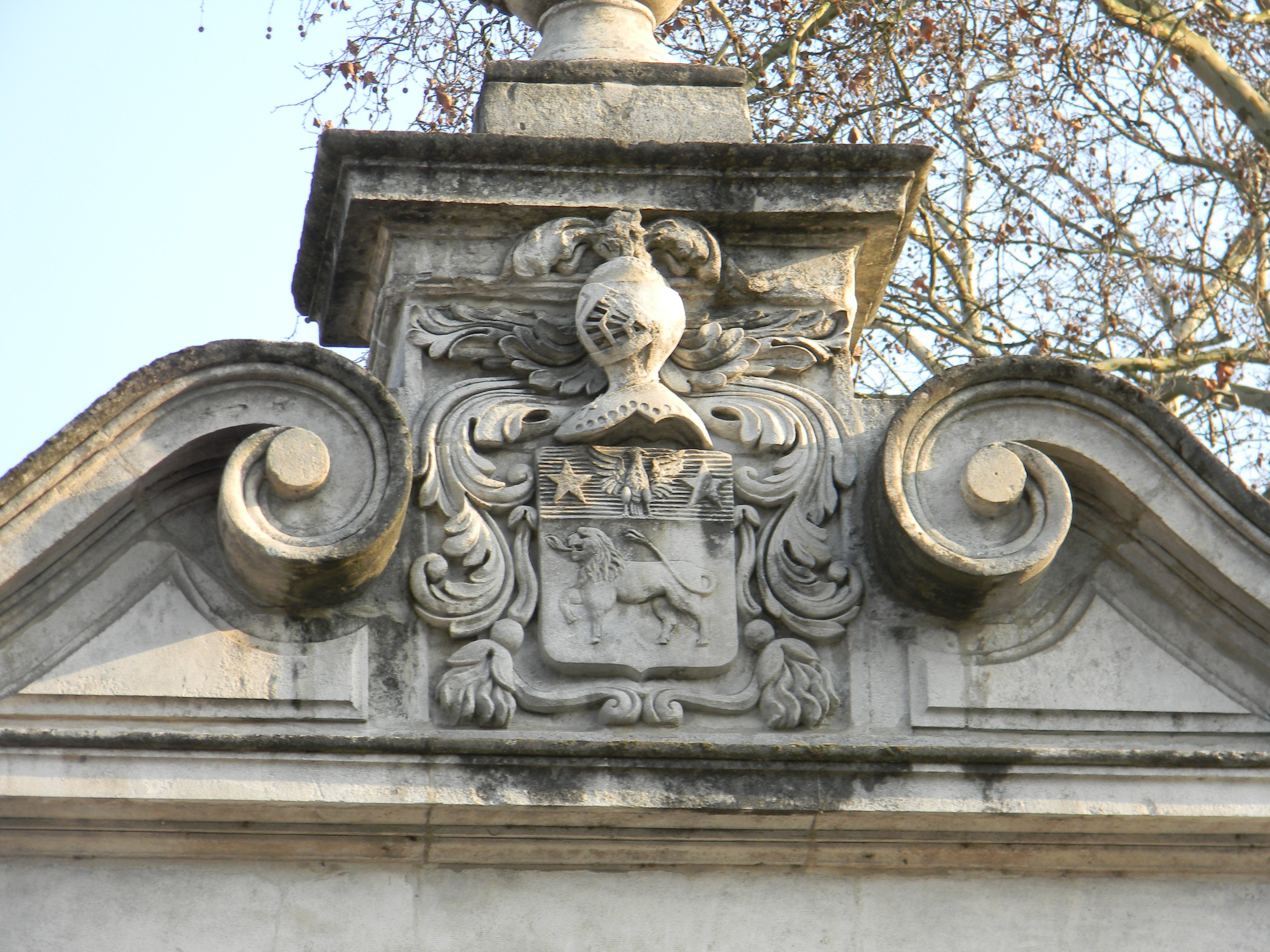 Détail de l'écusson figurant en haut du portail du château de la Pape à Rillieux-la-Pape : « D'argent au taureau passant d'or à la tête de lion de gueules, au chef d'azur chargé d'une aigle d'argent accostée de deux étoiles du même ».